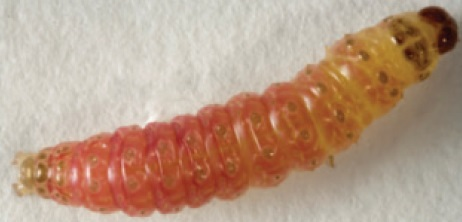 Leucinodes africensis